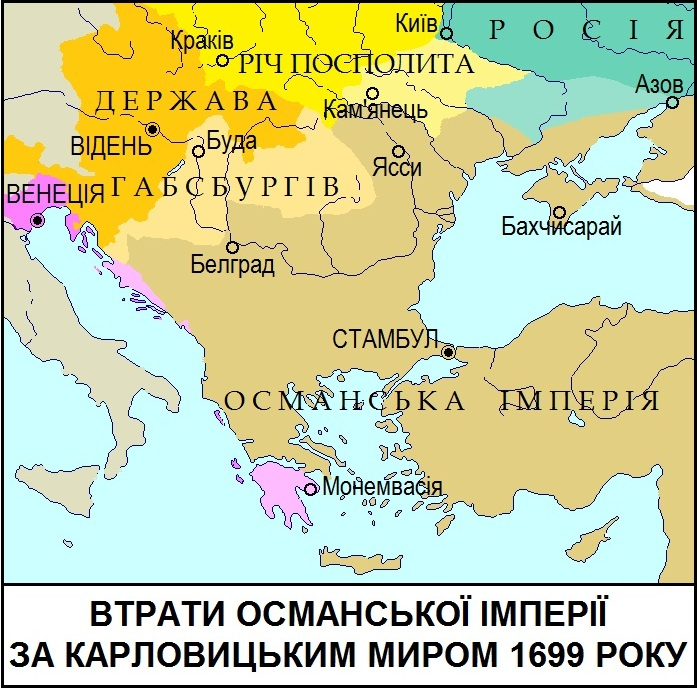 Втрати Османської імперії за Карловицьким миром